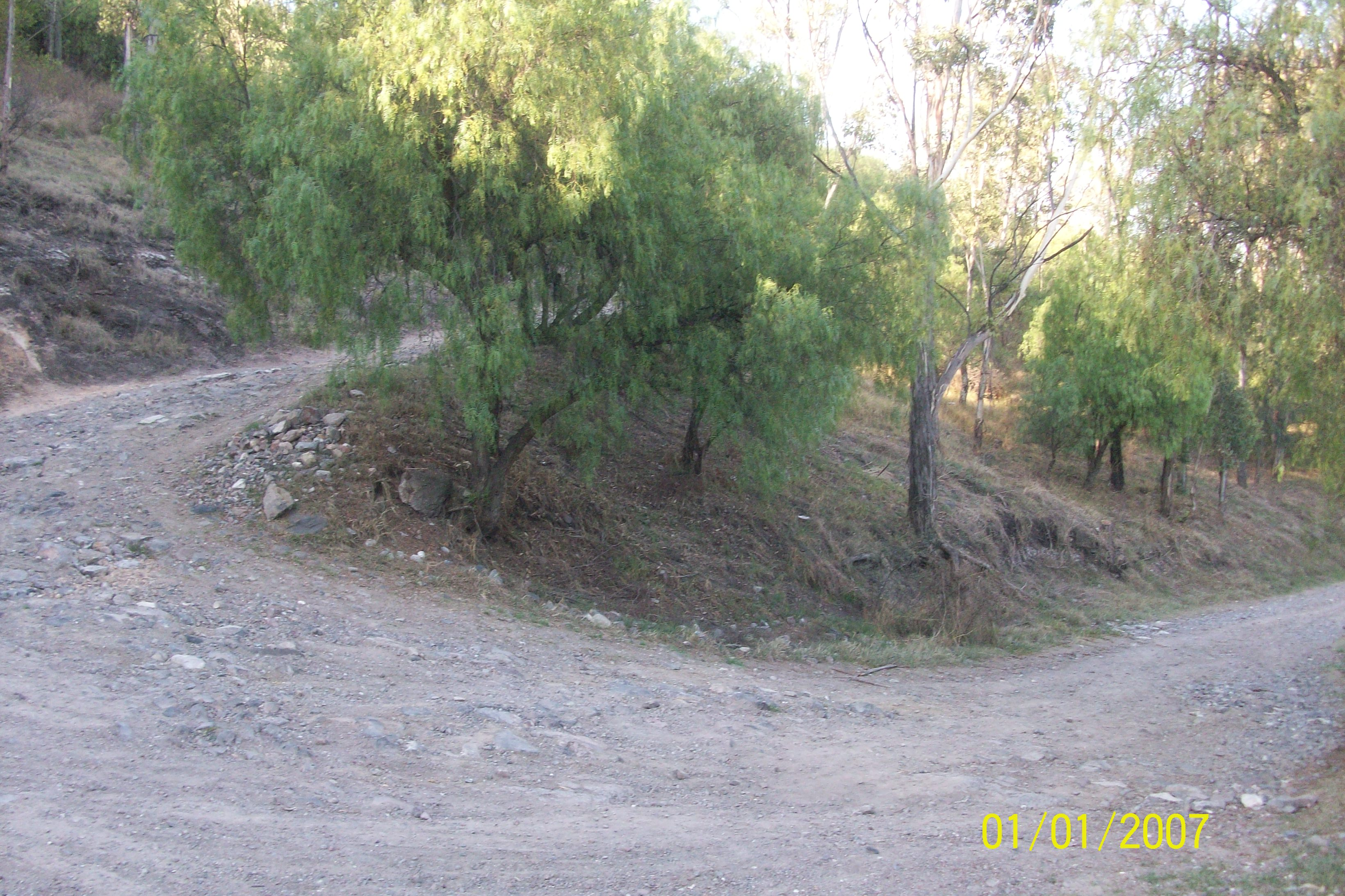 Pista de 1.300 km aprox mas caminos o laderas a diferentes puntos del cerro.